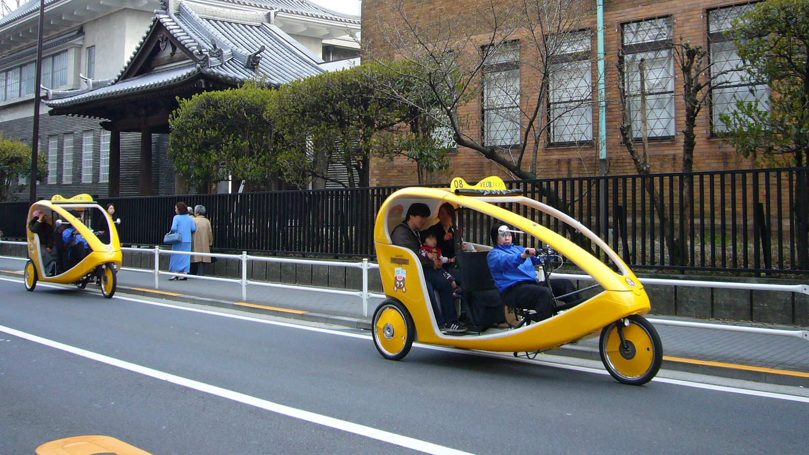 VELOTAXI at Taito-ku, Tokyo, Japan